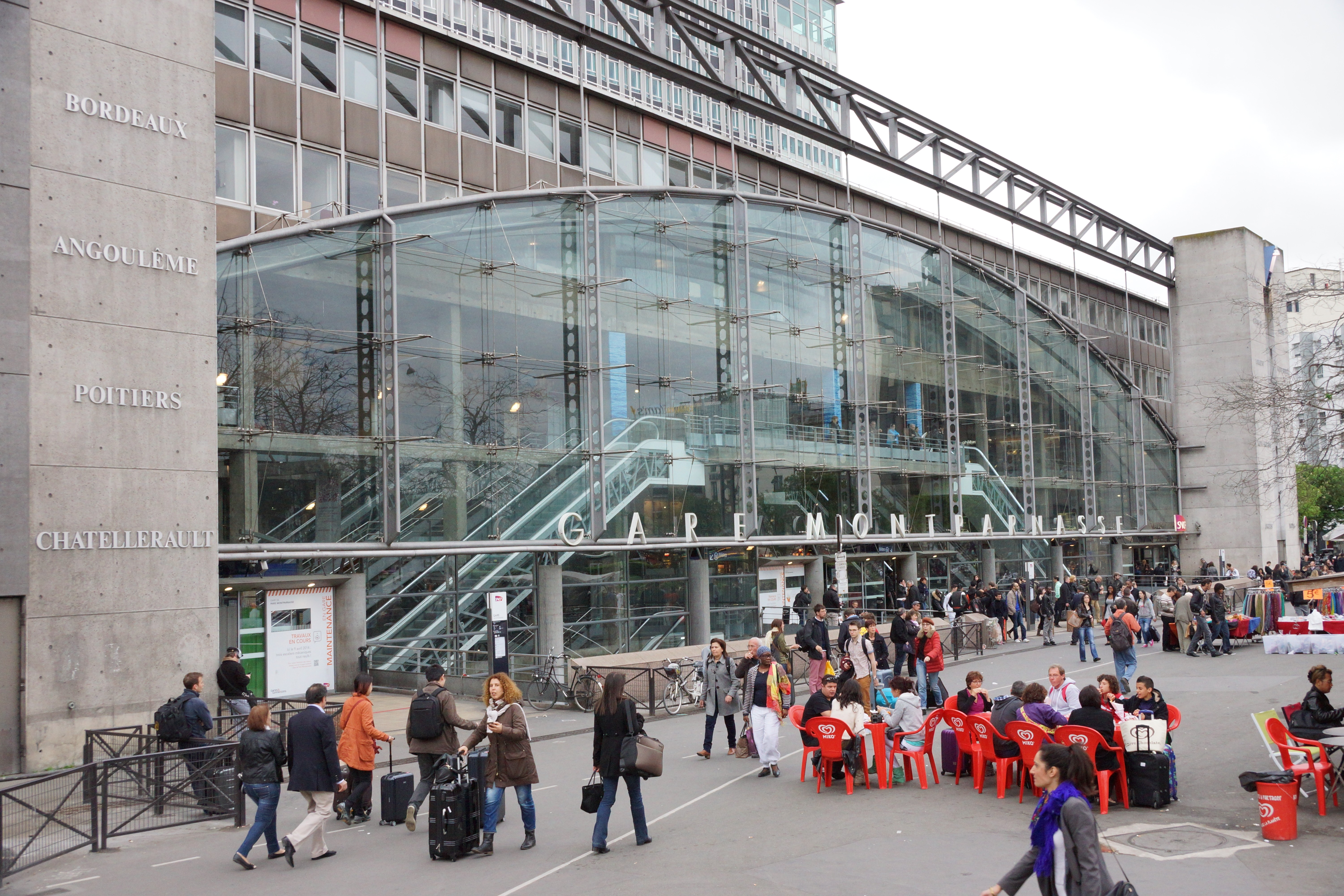 Gare Montparnasse, Paris, France.